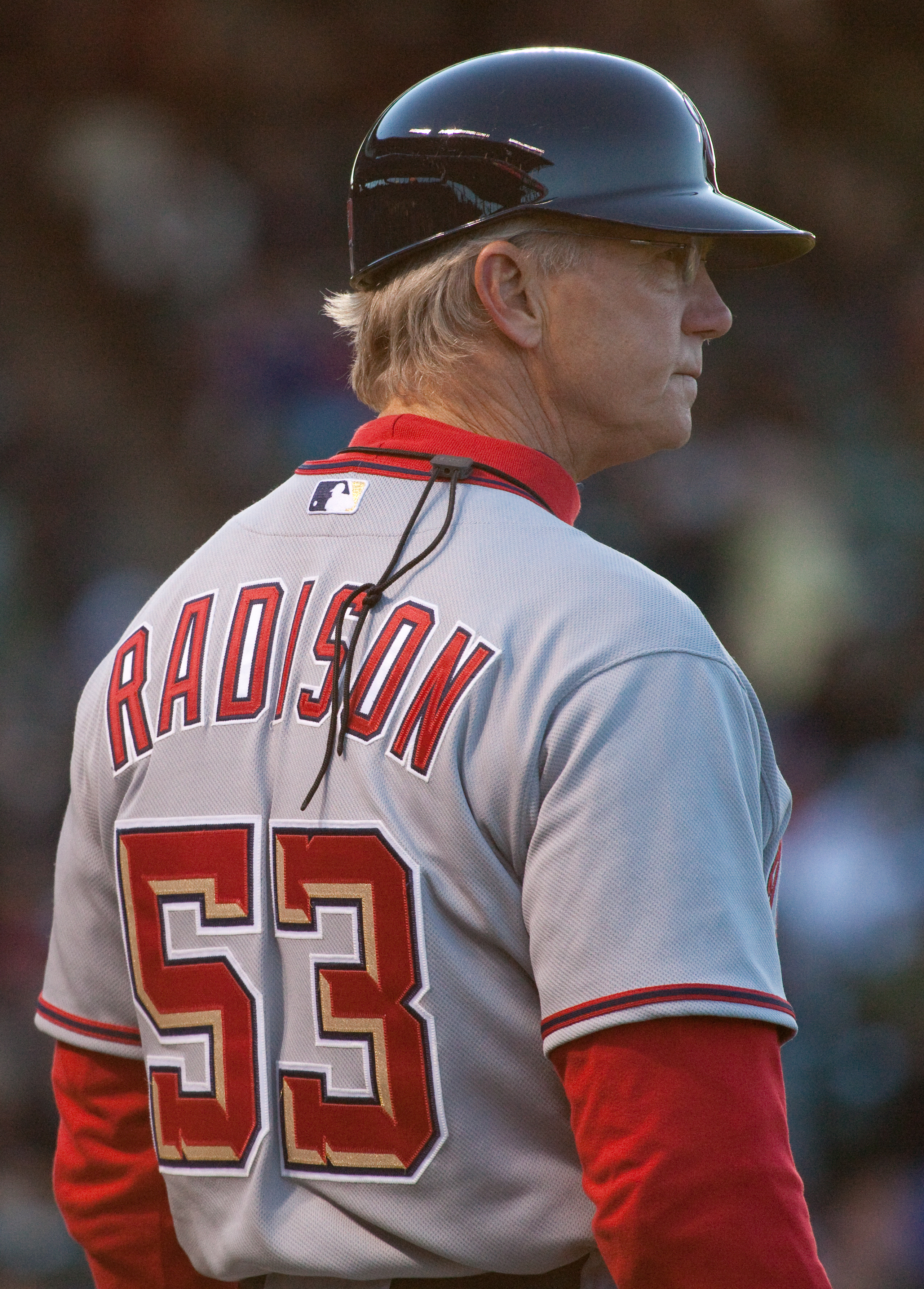 Dan Radison